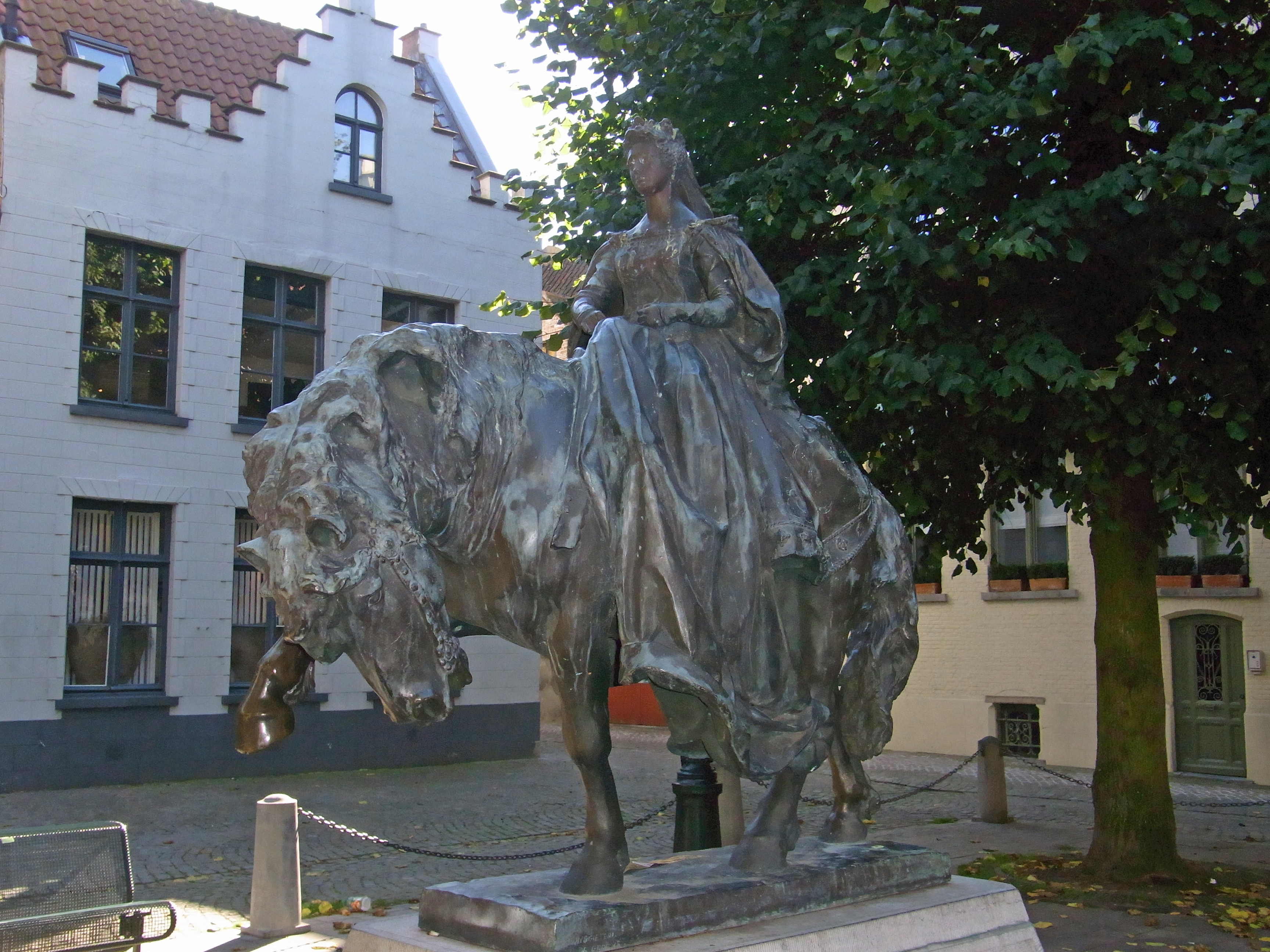 Brügge: Muntplein